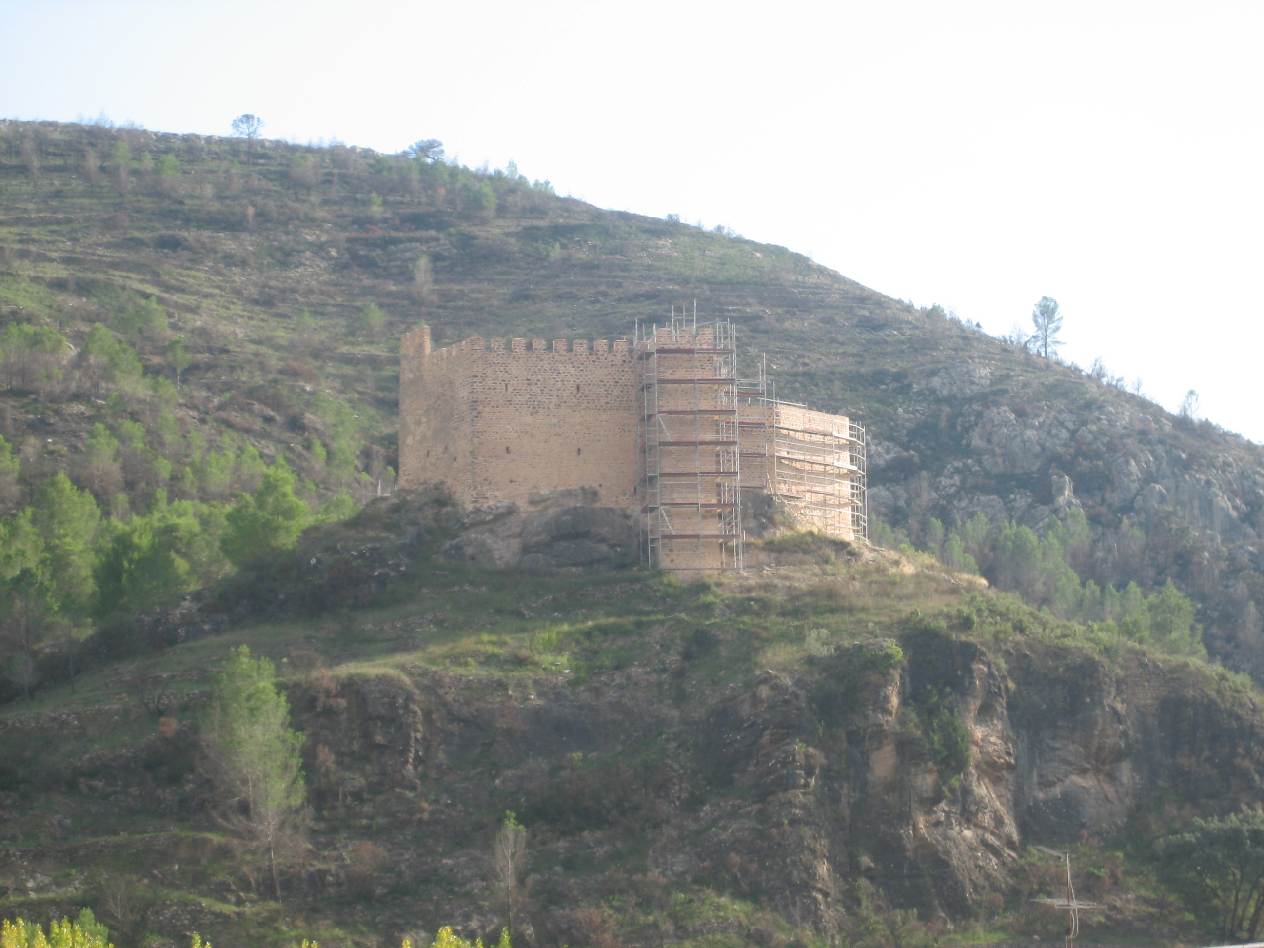 Castell de Gaibiel (Gaibiel, Alt Palància, País Valencià) 07.065-003.